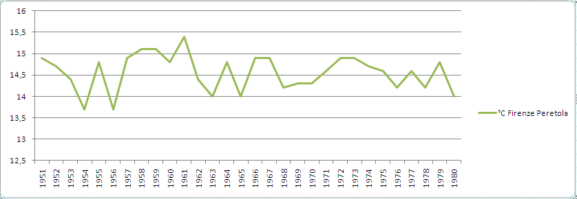 Stazione meteorologica di Firenze Peretola: andamento della temperatura media annua dal 1951 al 1980